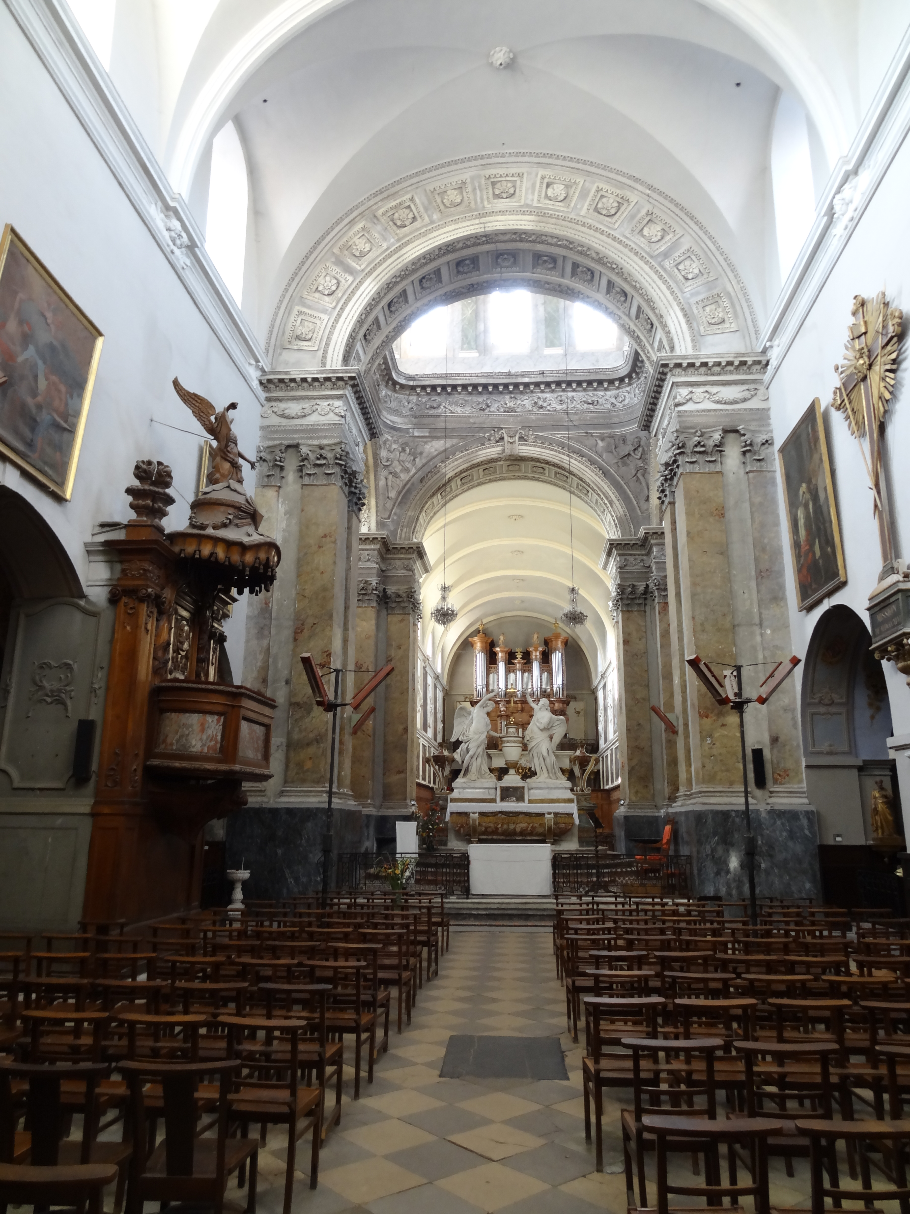 Église Saint-Pierre des Chartreux de Toulouse This building is en partie classé, en partie inscrit au titre des Monuments Historiques. .